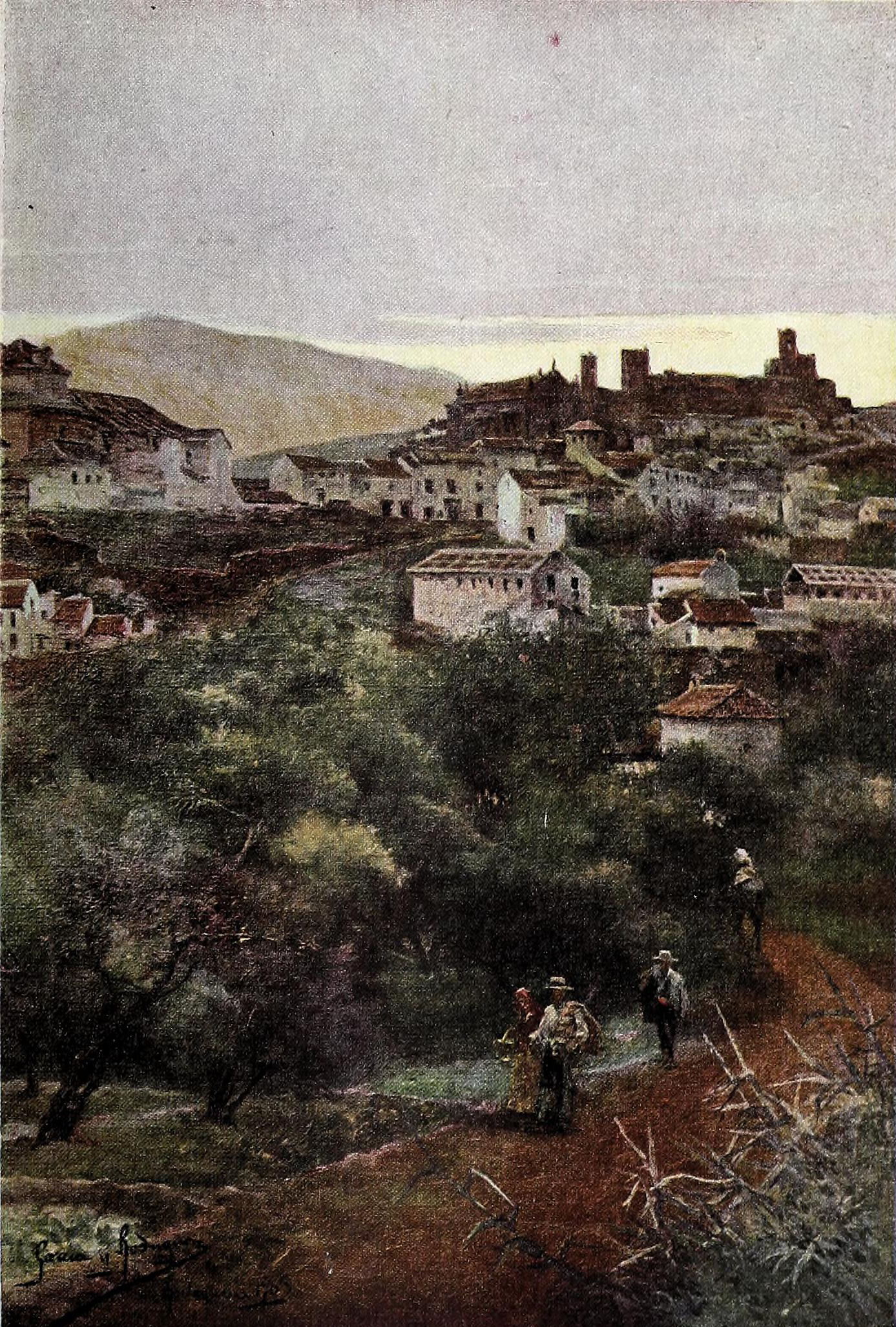 Antequera.